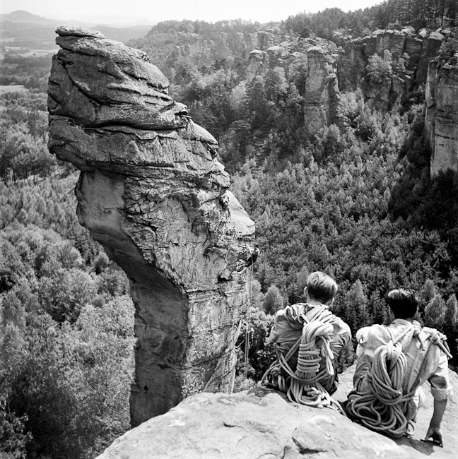 Příhrazy, Kobyla, negativ číslo: 3_4514